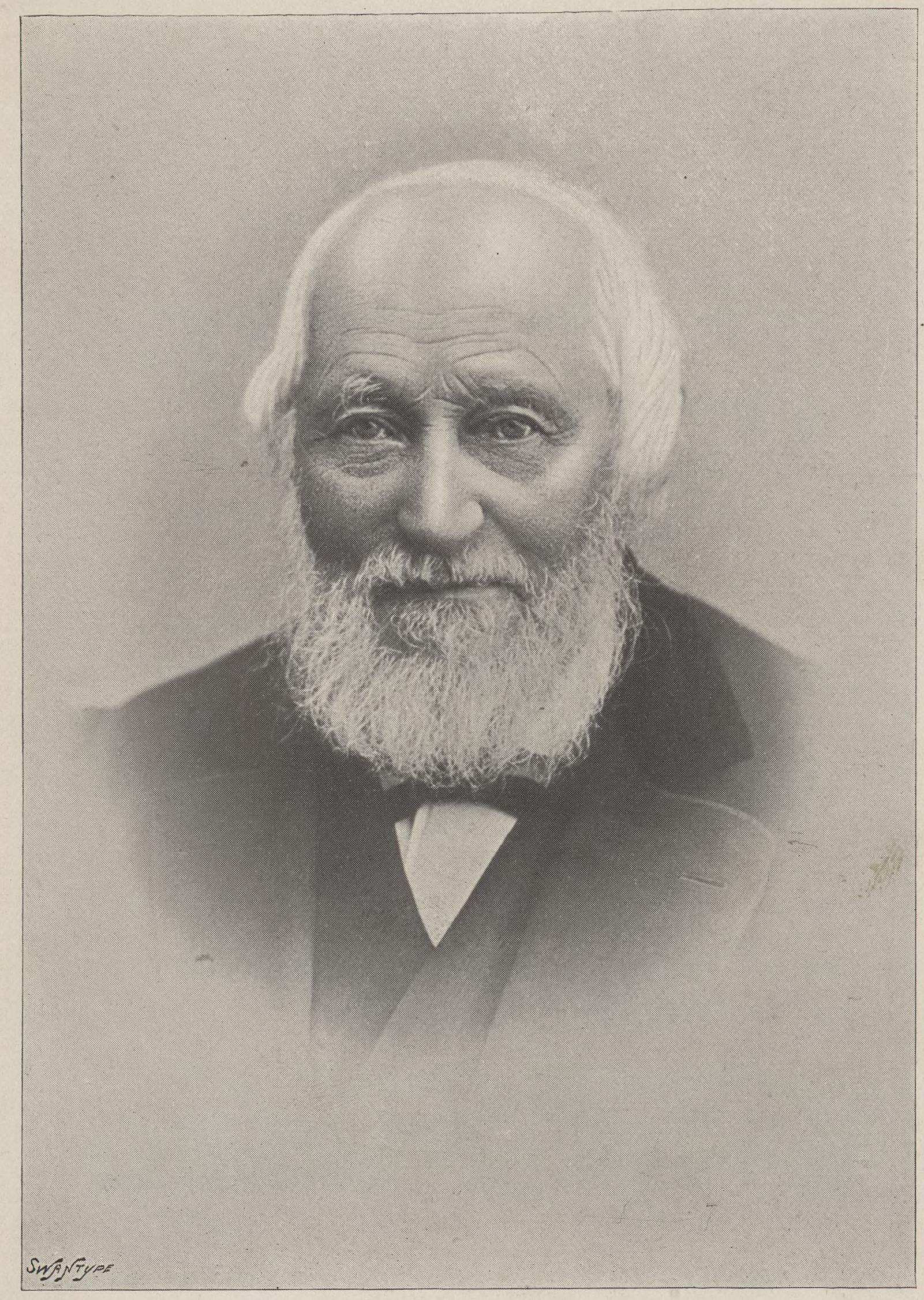 Illustrasjon hentet fra boken "The cruise of the "Antarctic" to the South Polar regions" av Bull, H.J. og utgitt av E. Arnold (London, 1896) Depicted person: Svend Foyn